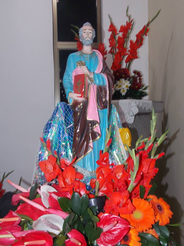 Imagem do Primeiro São Pedro.